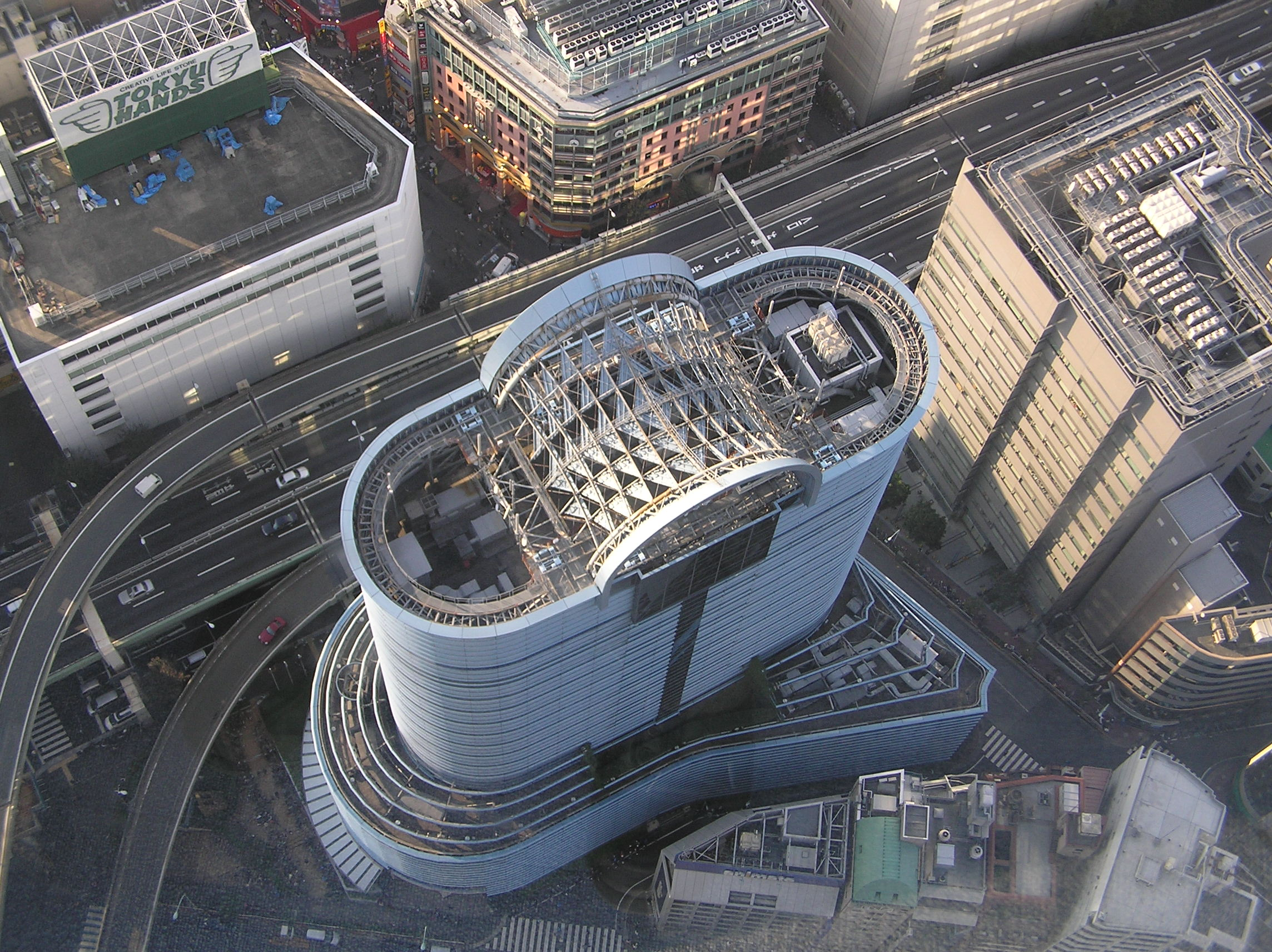 Amlux Tokyo Toyota